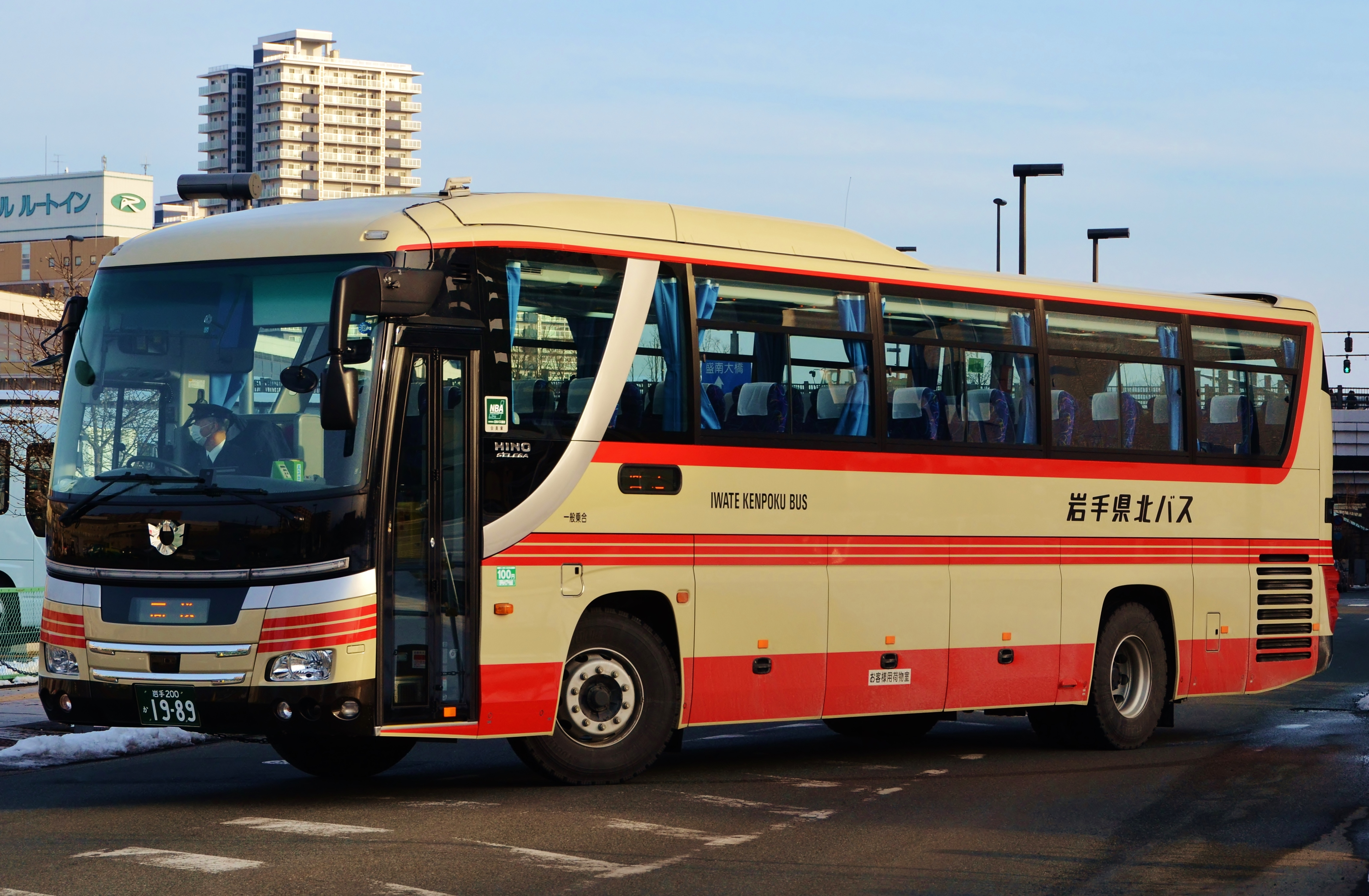 106急行 岩手200か 1989